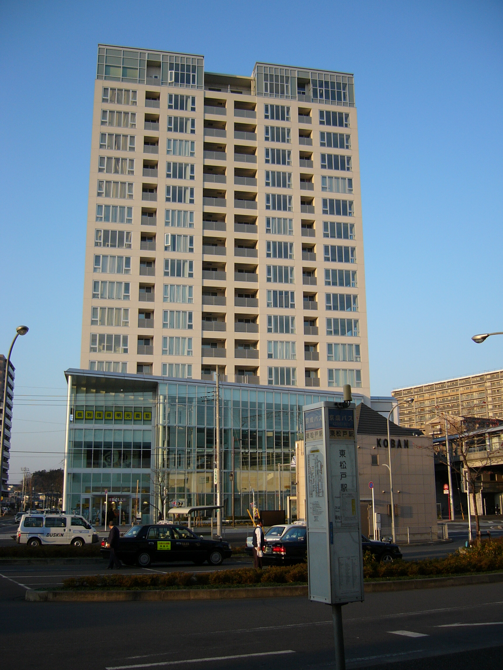 東松戸駅前ビル「東松戸アルフレンテ」（2007年）.